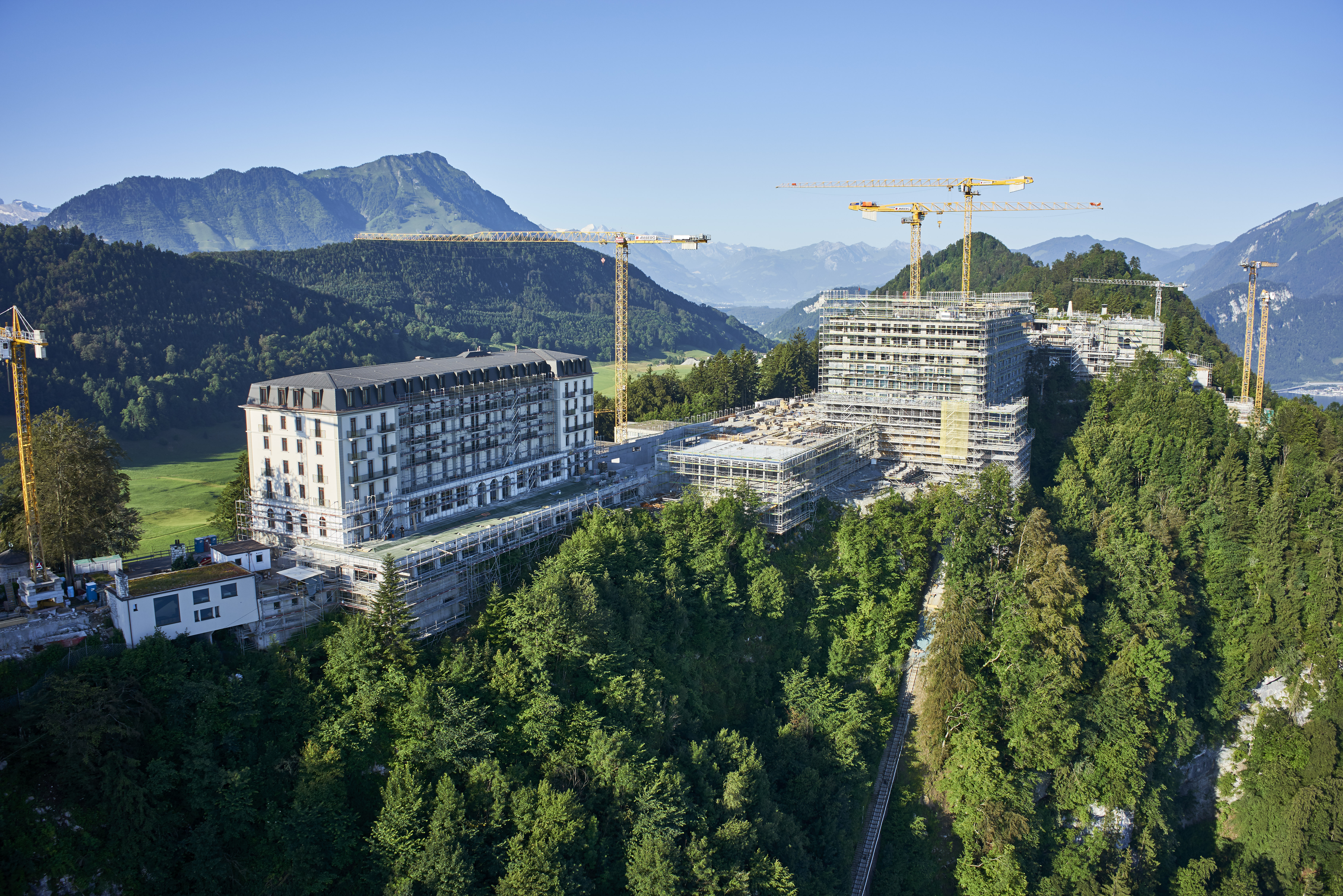 Hotelkomplex Bürgenstock im Morgenlicht. Flugaufnahme Falcon8-Copter. Blickrichtung Südwest.